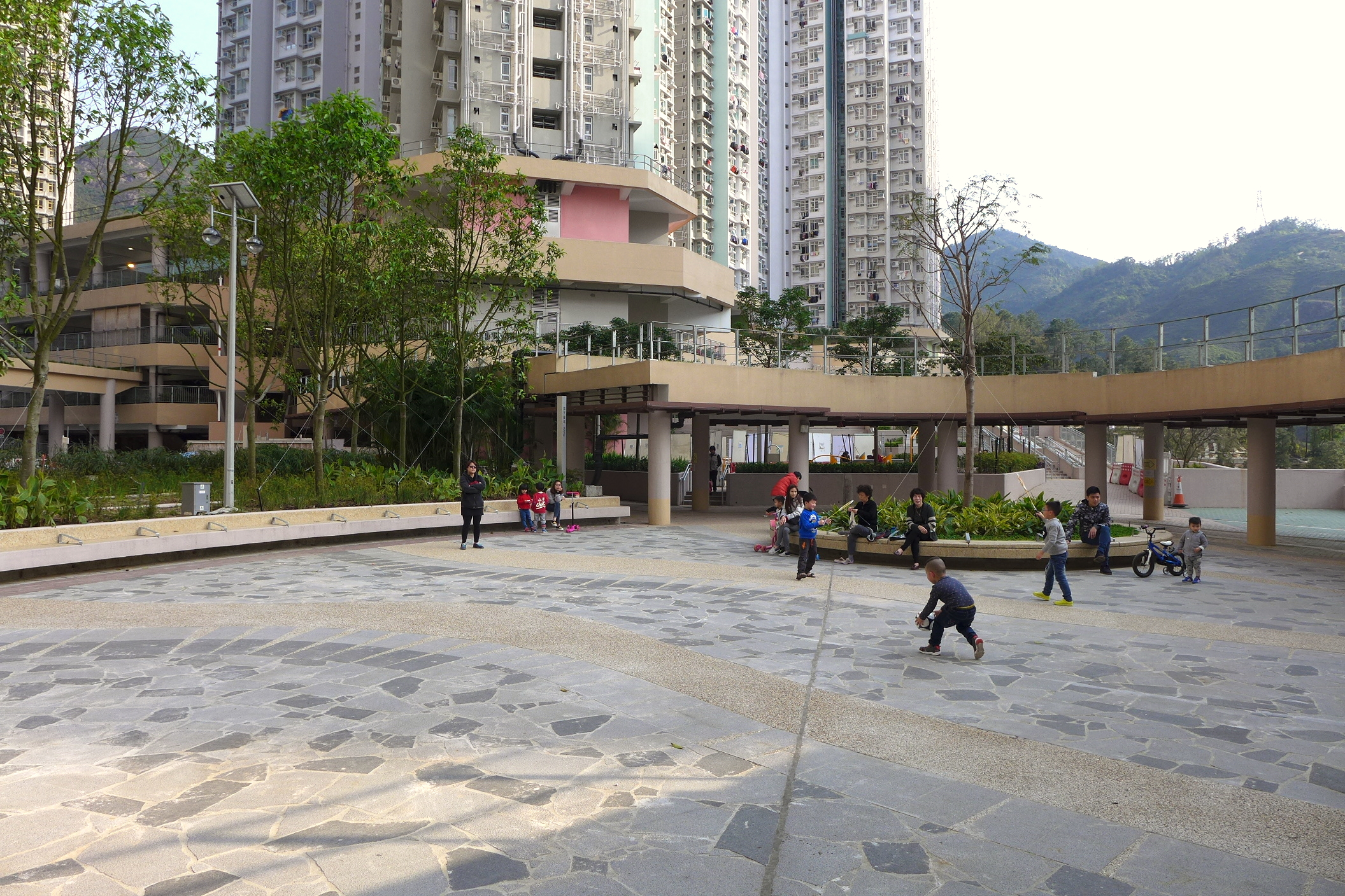 Shui Chuen O Estate Phase 1 Plaza